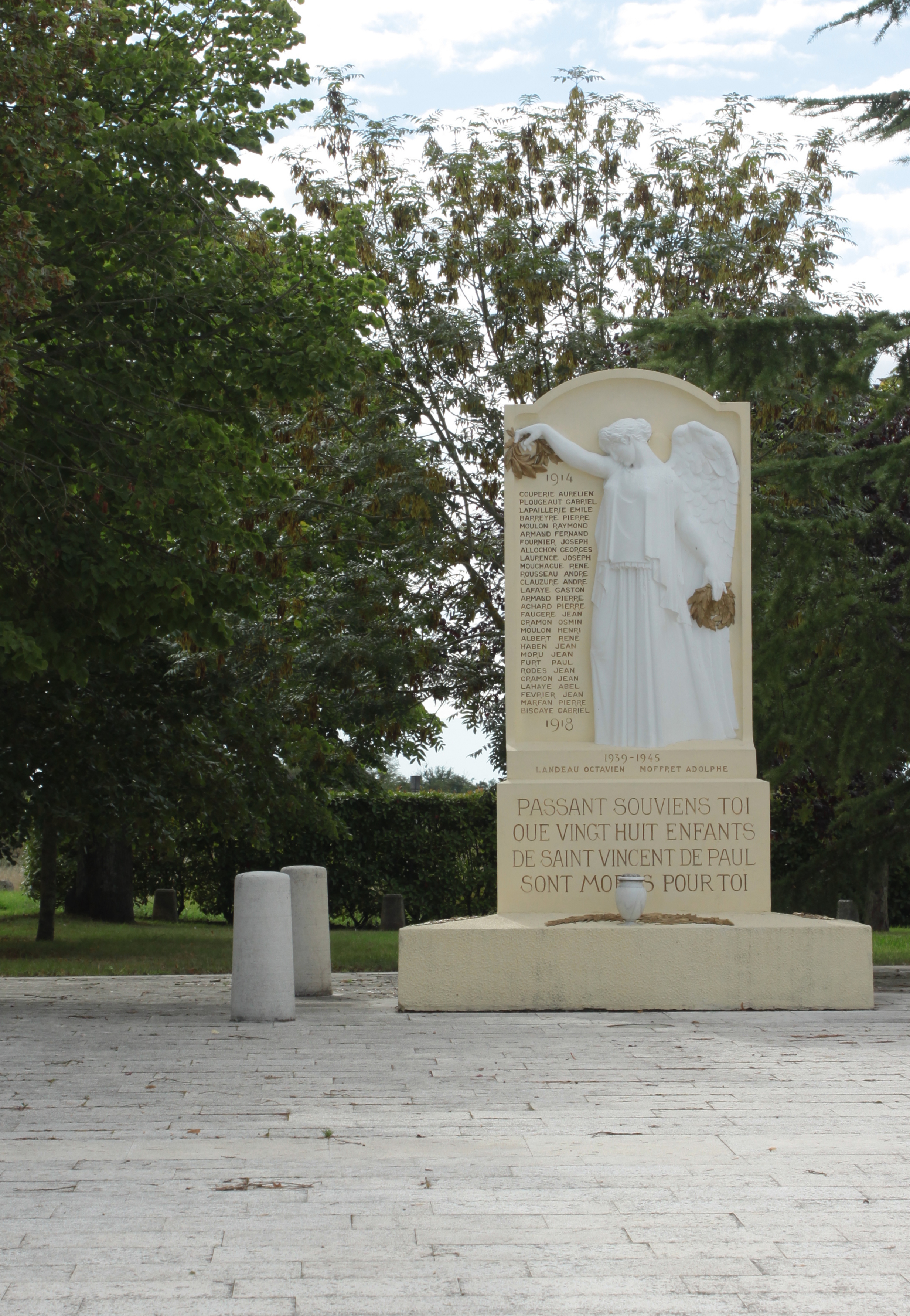 Krichsmonument zu Saint-Vincent-de-Paul